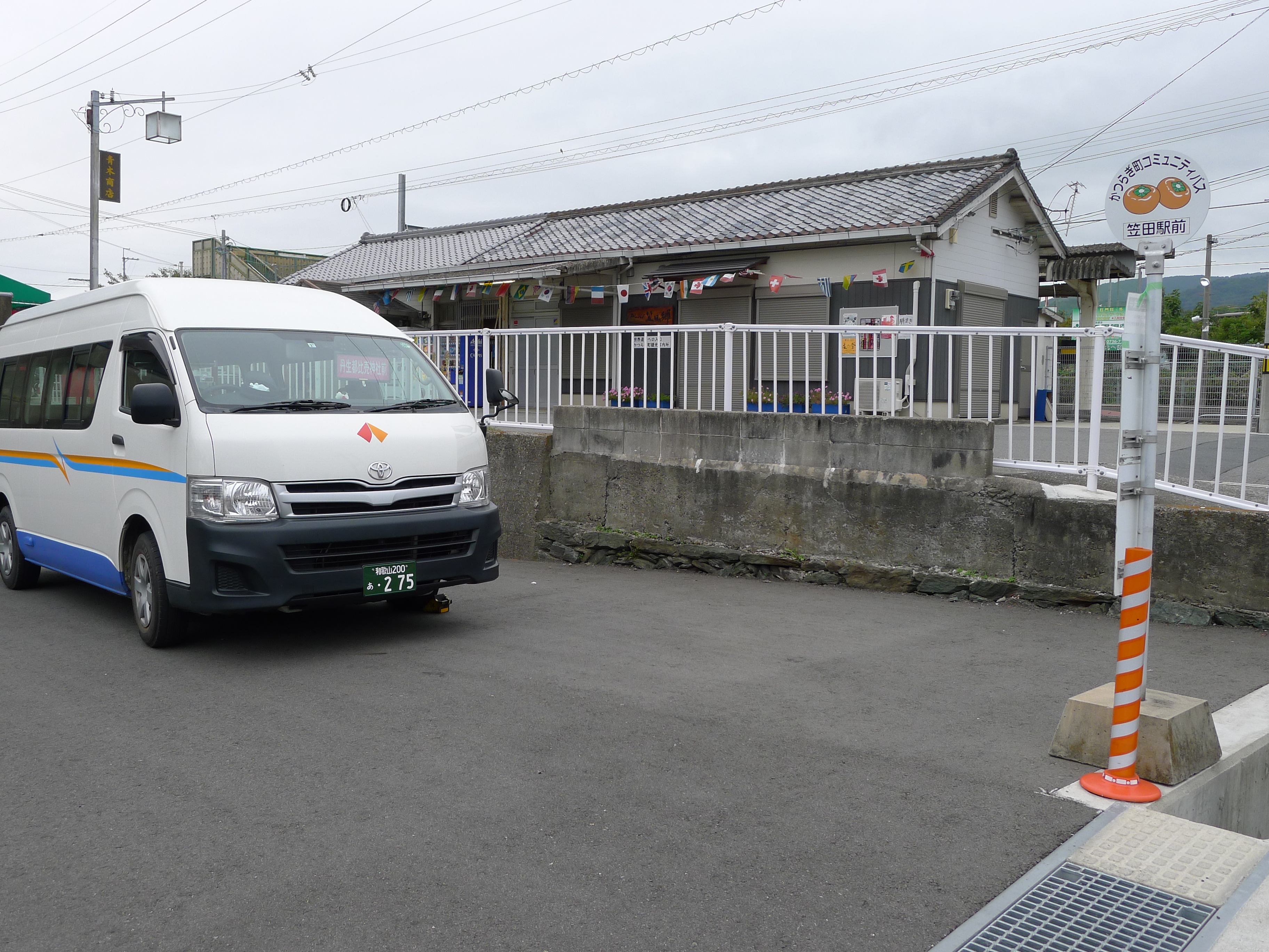 JR和歌山線笠田駅前のかつらぎ町コミュニティバス乗り場、停車しているワゴン車タイプは世界遺産の丹生都比売神社行き